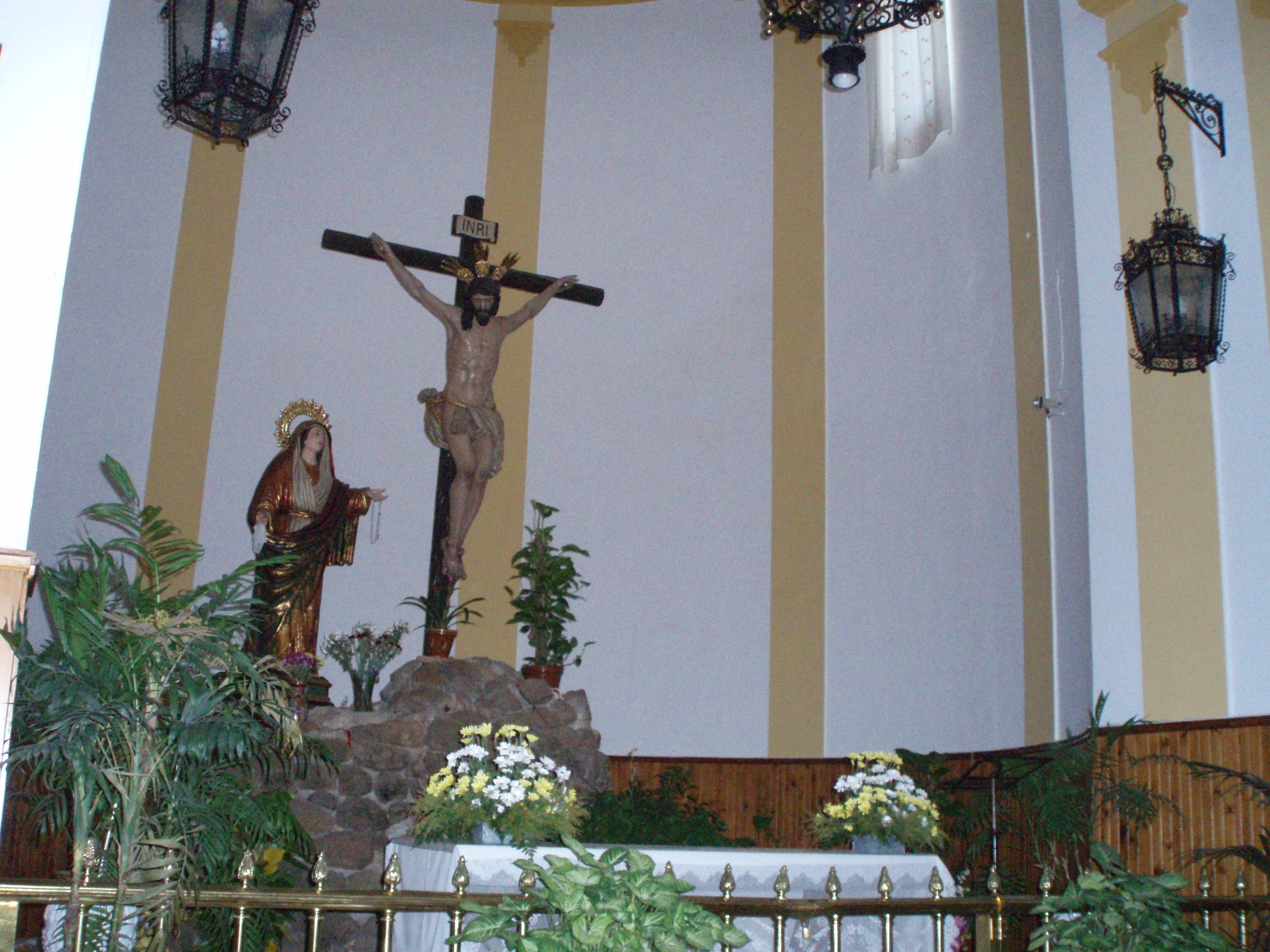 Imagen del Santísimo Cristo de las Injurias dentro de la Ermita en Hinojosa del Duque (Córdoba)